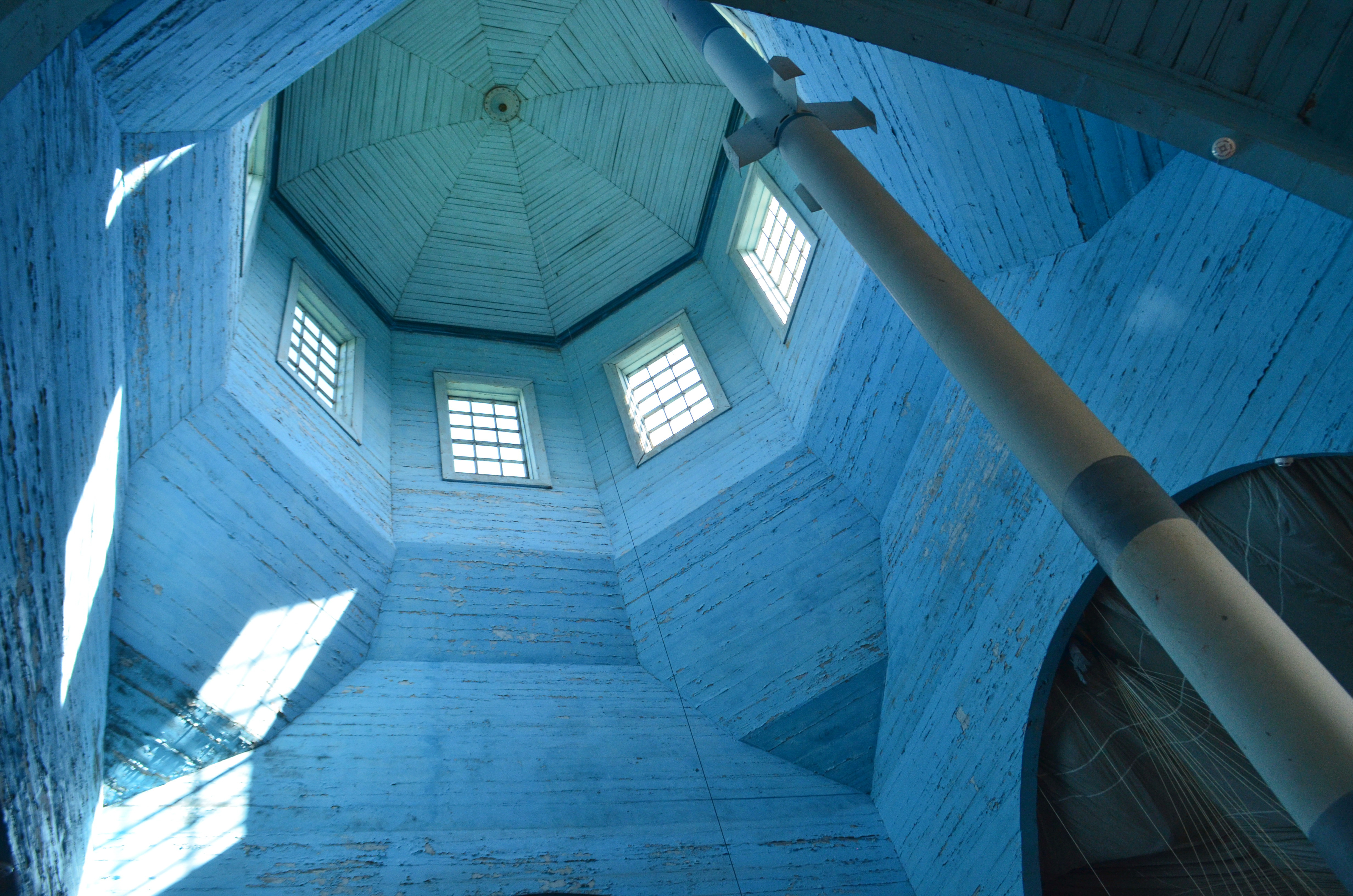 Переяслав-Хмельницький. Церква Параскеви П'ятниці з села В'юнище. 1892 р. Зараз - музей космосу.